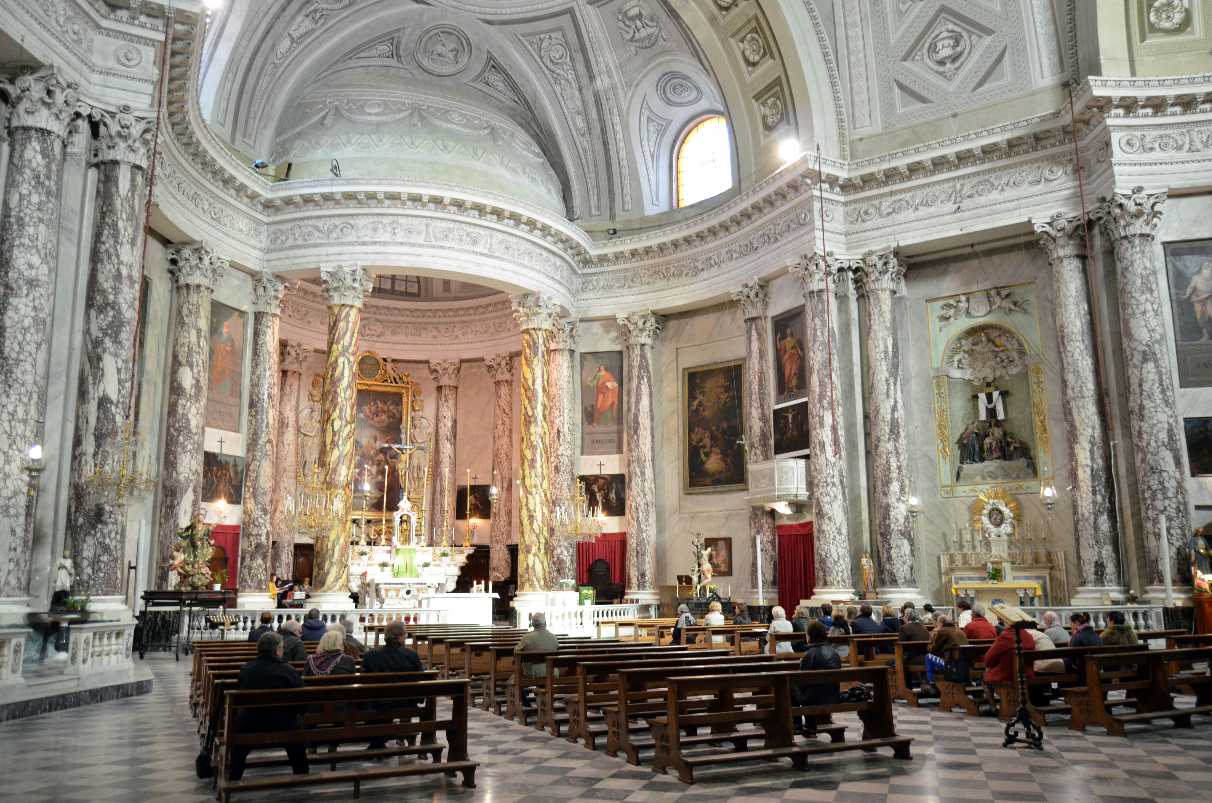 La collegiata di San Giovanni Battista, Pieve di Teco, Liguria, Italia